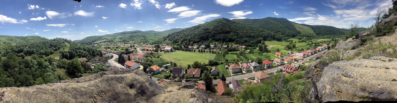 Istenmezeje község egyik nevezetessége a Noé Szőlőjének nevezett homokkő képződmény, ennek tetejéről készült panorámakép mutatja a falu látképét.